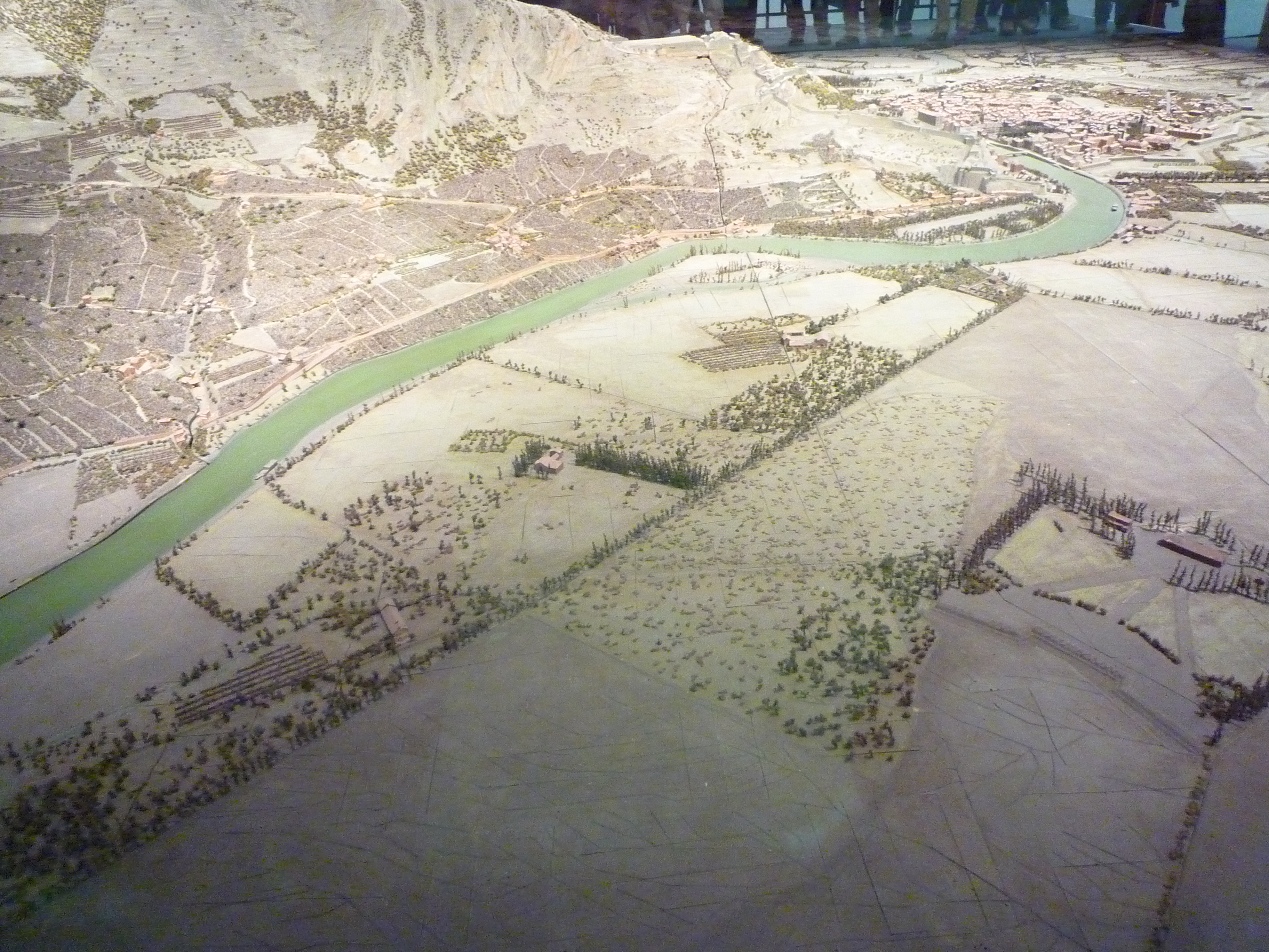 Polygone d'artillerie sur le plan relief de Grenoble (1848), sur la droite de l'image. Futur emplacement du polygone scientifique.